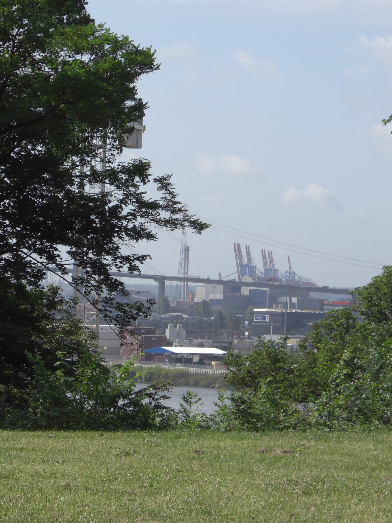 Heine-Park in Hamburg Altona, Aussicht von der Wiese neben der Villa; im Hintergrund die Köhlbrandbrücke und der Hamburger Hafen.